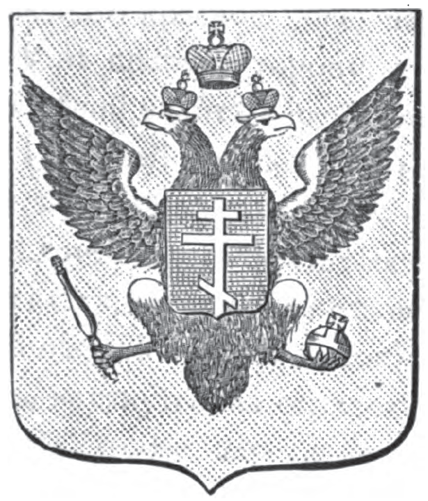 Герб Таврической области 1784 года